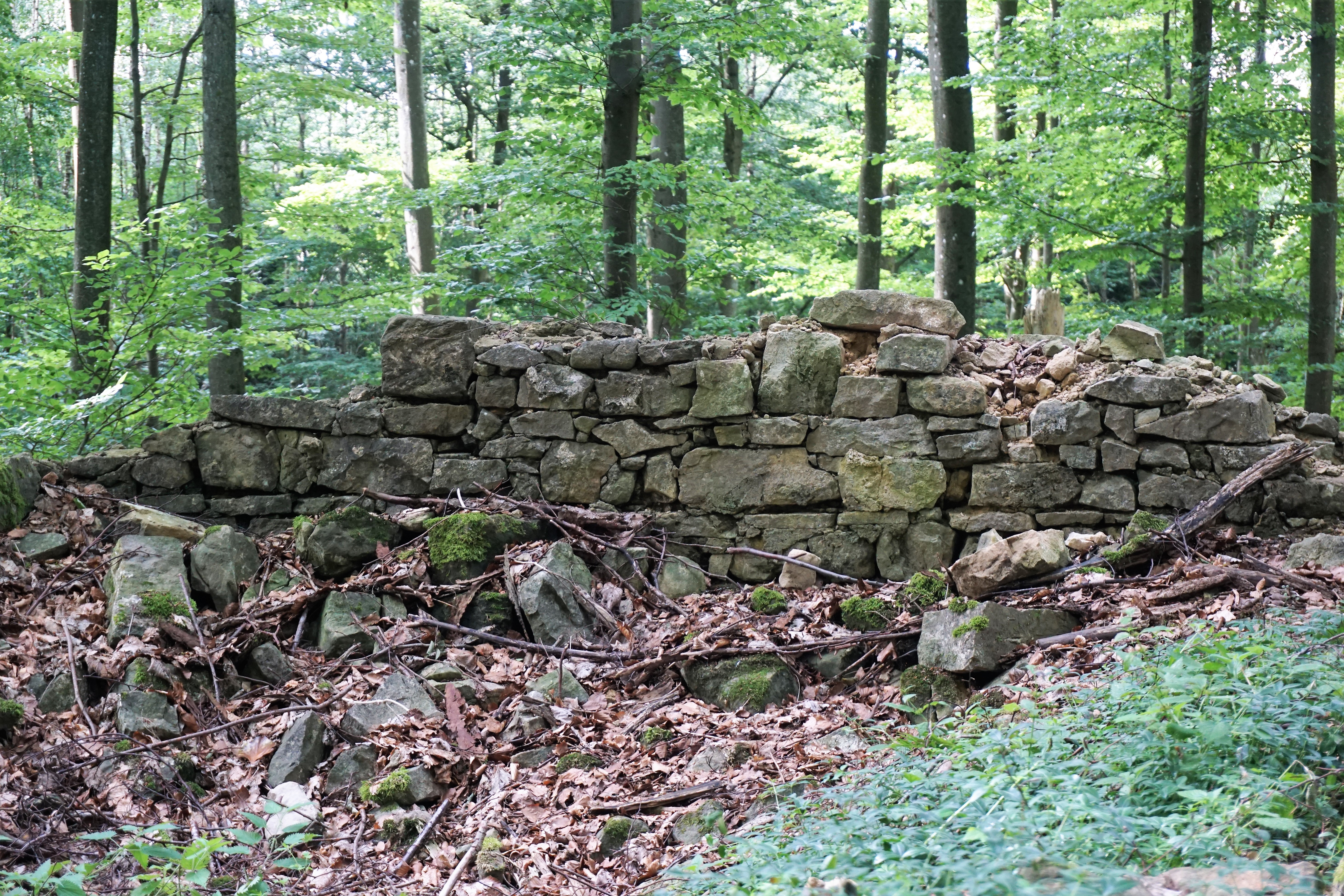 Steesel, Ruin vum Geeschterhaischen am Gréngewald.